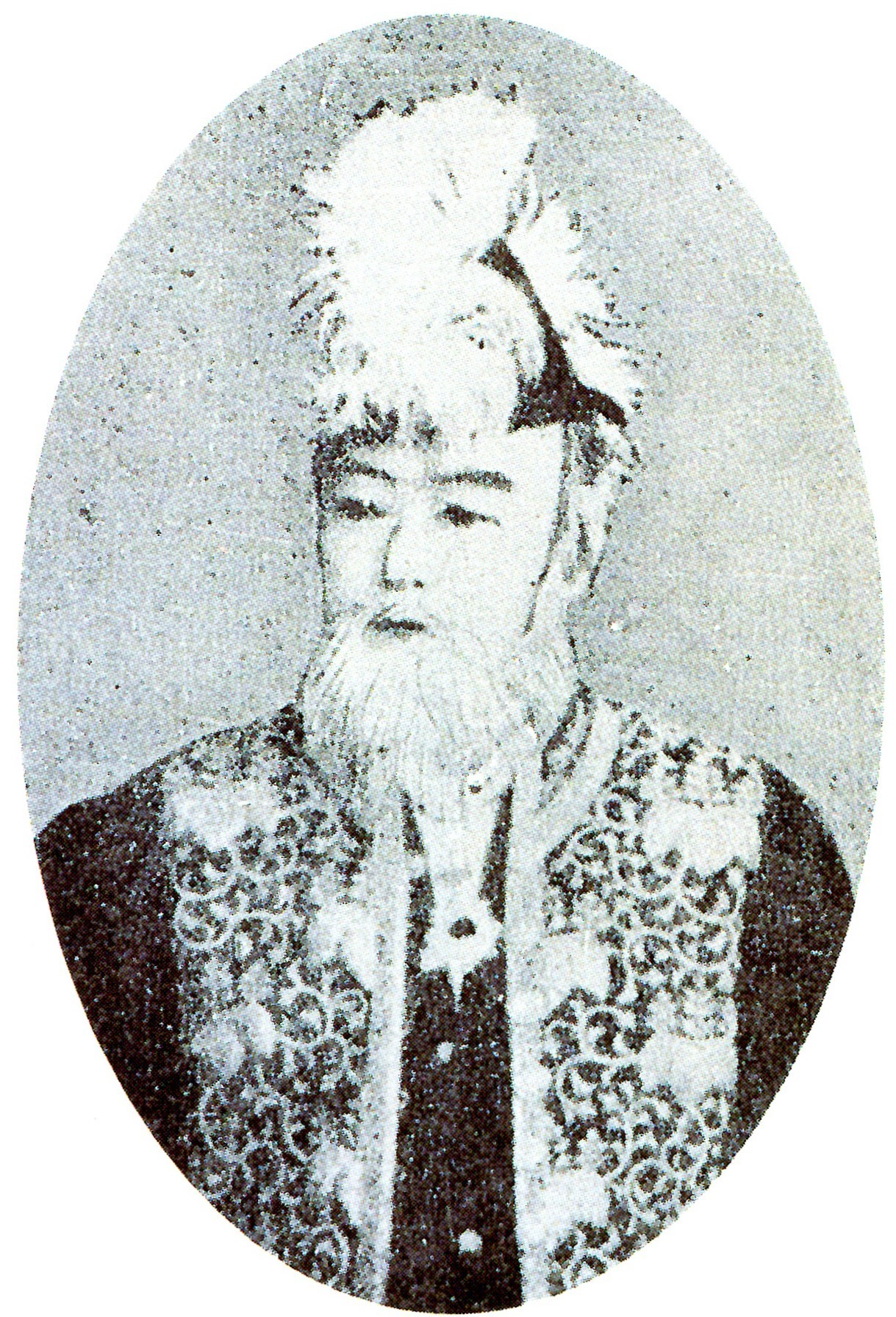 佐土原藩主島津忠寛の肖像写真。